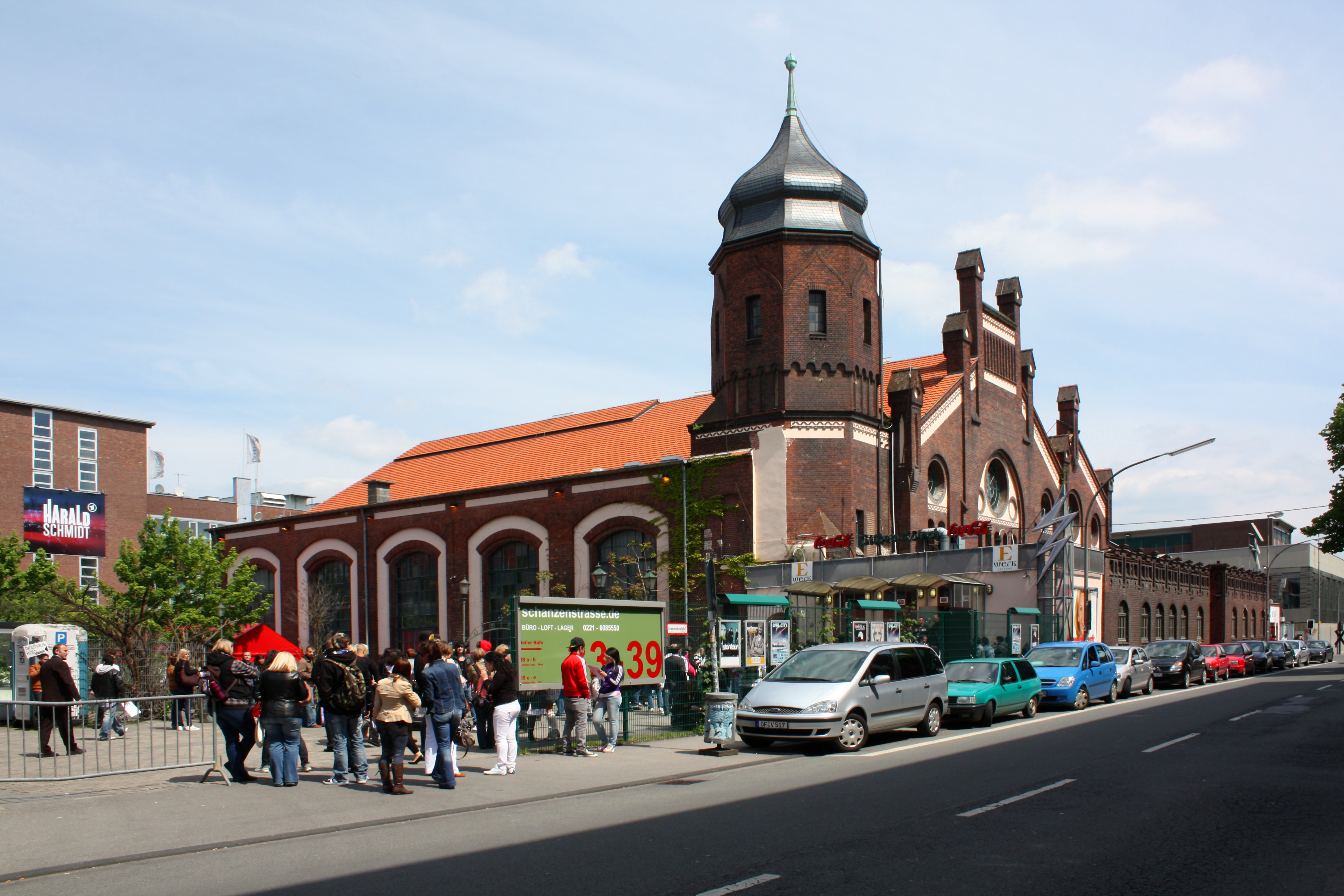 E-Werk, "Eventhalle" Köln-Mülheim, Schanzenstraße